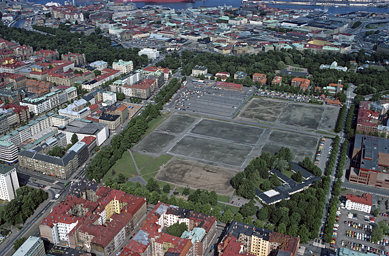 Flygbild över Heden med omgivning. I bakgrunden stadsdelen Inom Vallgraven. T.v. och i förgrunden stadsdelen Lorensberg Motiv: Göteborg Nyckelord: Flygbilder, Riksintressen Kategori: Stadsmiljö Flygbild över Exercisheden i stadsdelen Heden med omgivning. I bakgrunden stadsdelen Inom Vallgraven. T.v. stadsdelen Lorensberg.